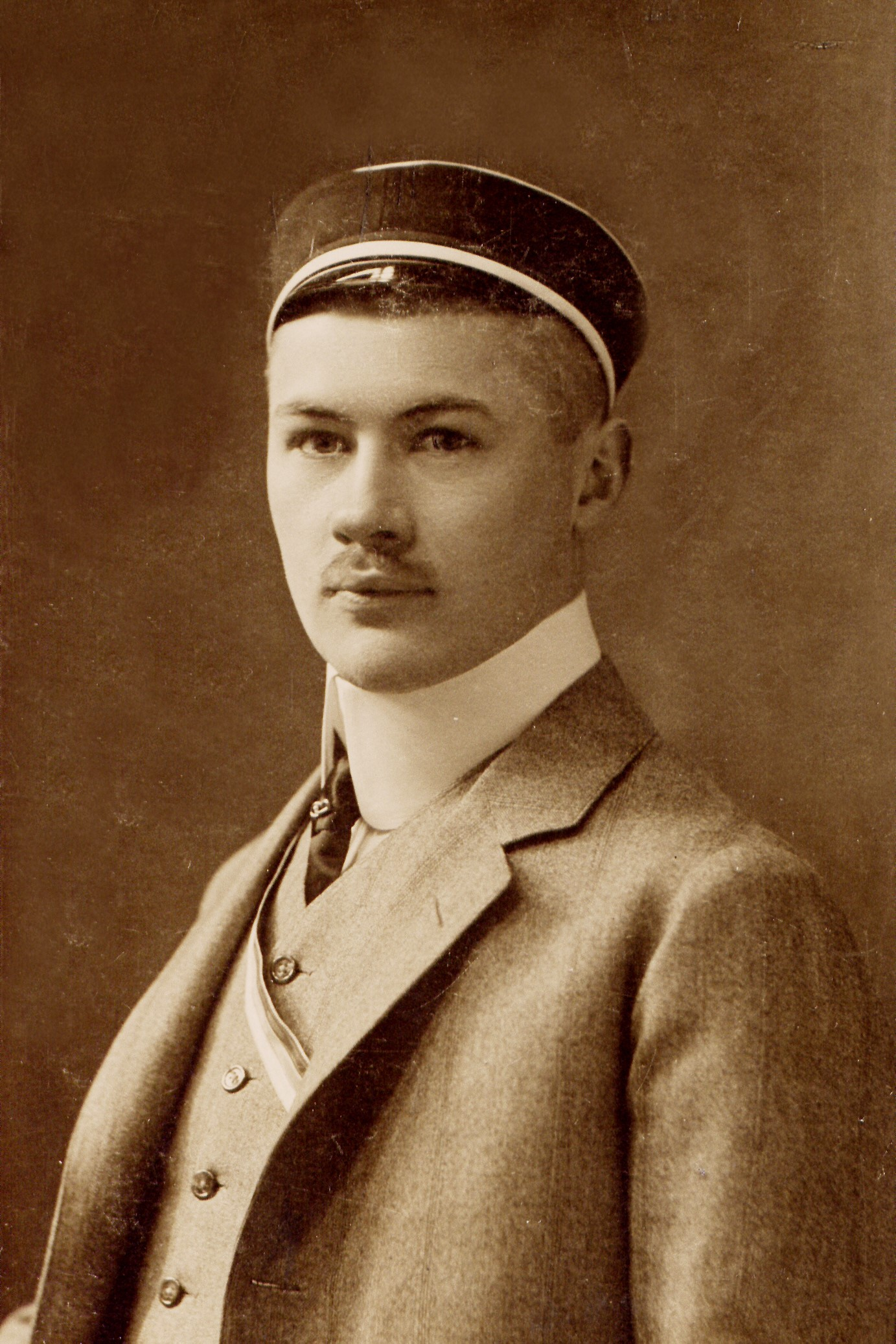 Porträtfotografie vom Eberhard Buchwald